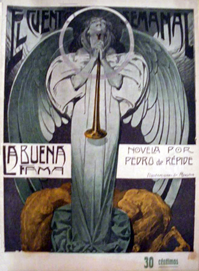 Portada de La buena fama.